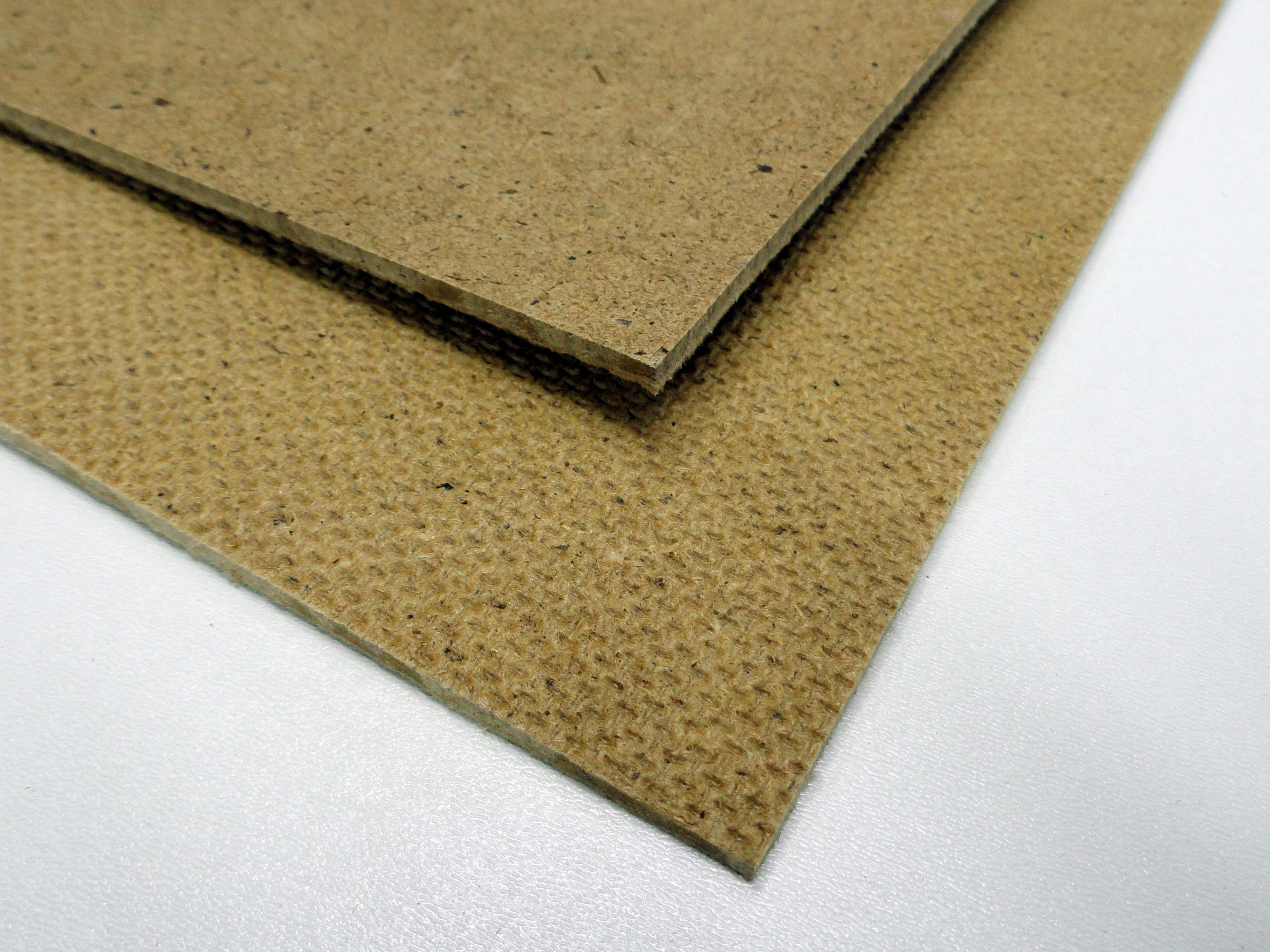 Fibreboard